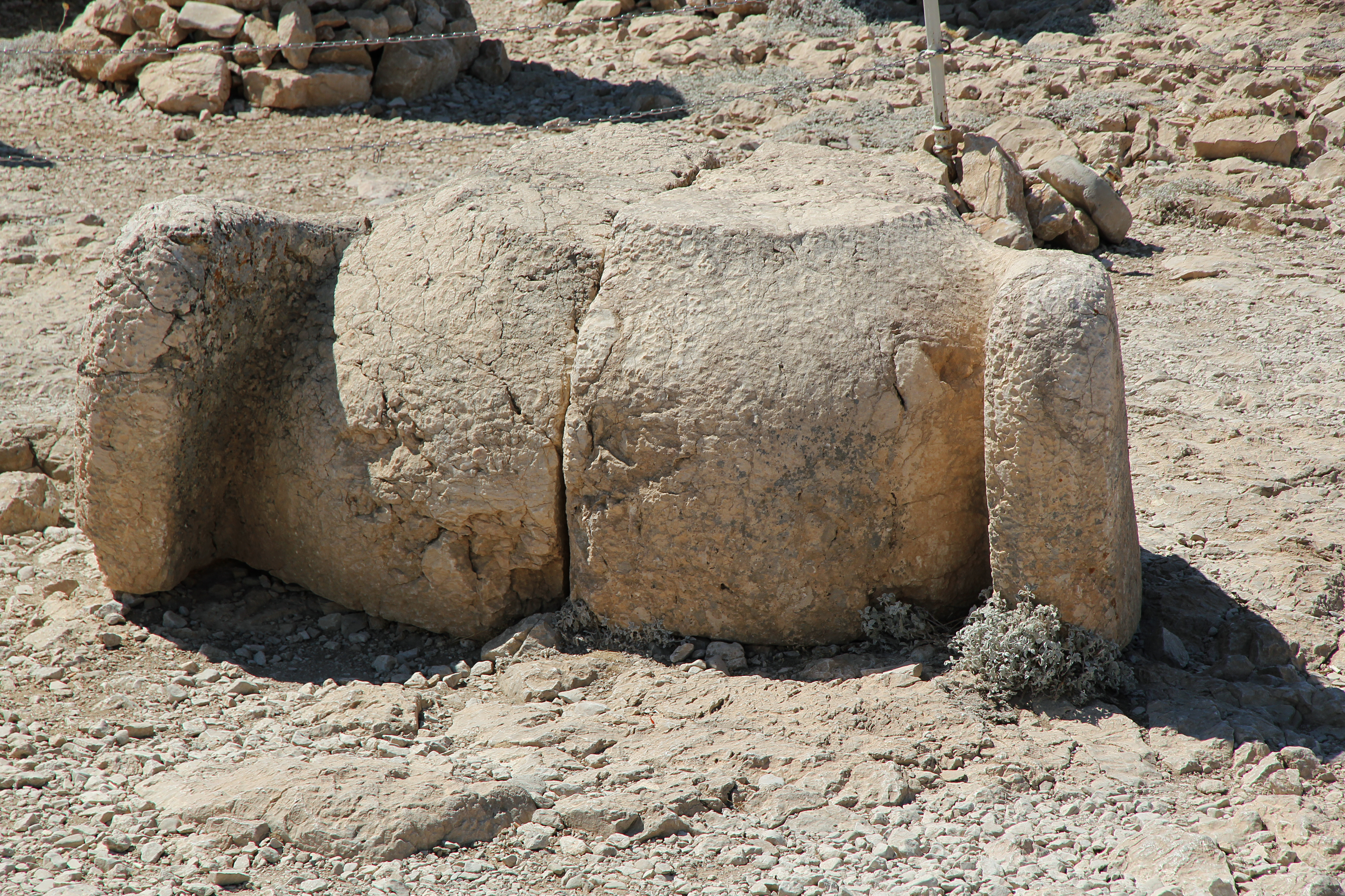 Schulterteil der Adlerstatue, Nemrut Dağı, Südosttürkei, Ostterrasse